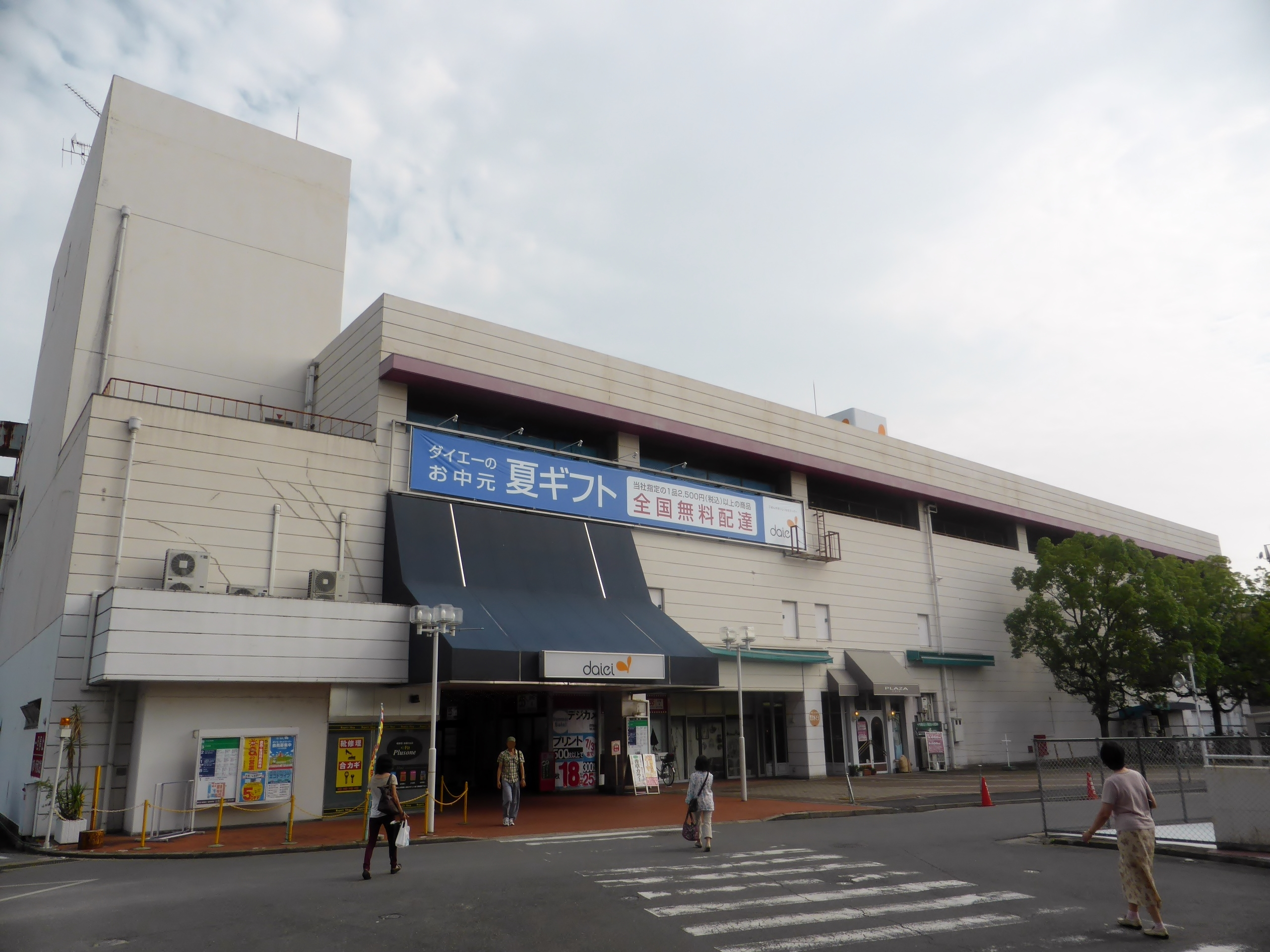 奈良県内唯一のダイエー店舗であり旧・ユニード最東端店舗であるダイエー富雄店を撮影。